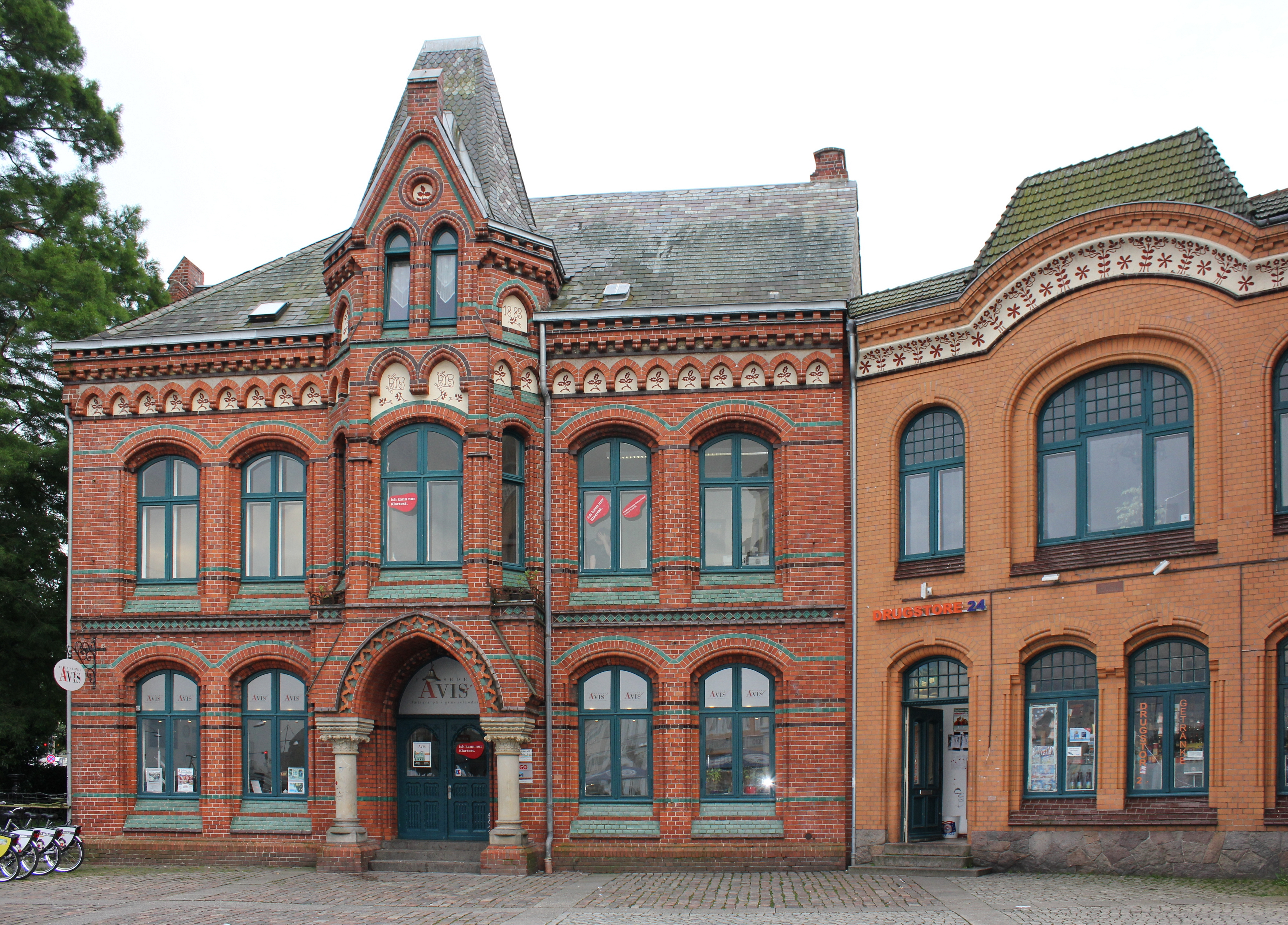 Flensburger Gebäude in der Schiffbrückstraße am Schiffbrückplatz (beziehungsweise auch Willy-Brandt-Platz genannt); zur linken Seite: Gebäude Schiffbrückstraße 8 (erbaut 1883 gemäß Inschrift zur rechten des kleinen Turmes), in in dem die Flensborg Avis zu finden ist und welches die Polizeistation in der Serie Da kommt Kalle darstellt.